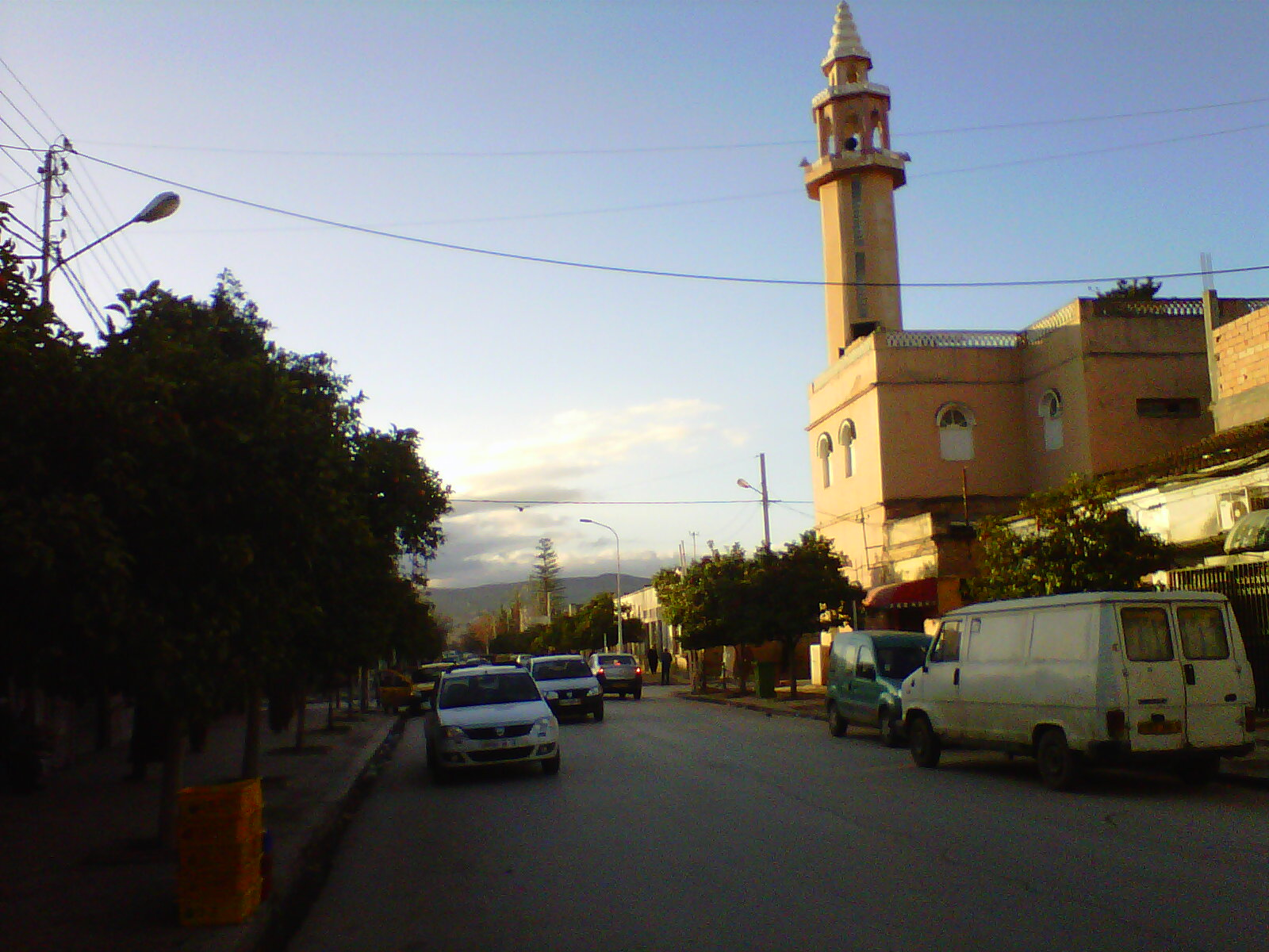 Mosquée Rue Emir Abdelkader Mohammadia Mascara Algérie